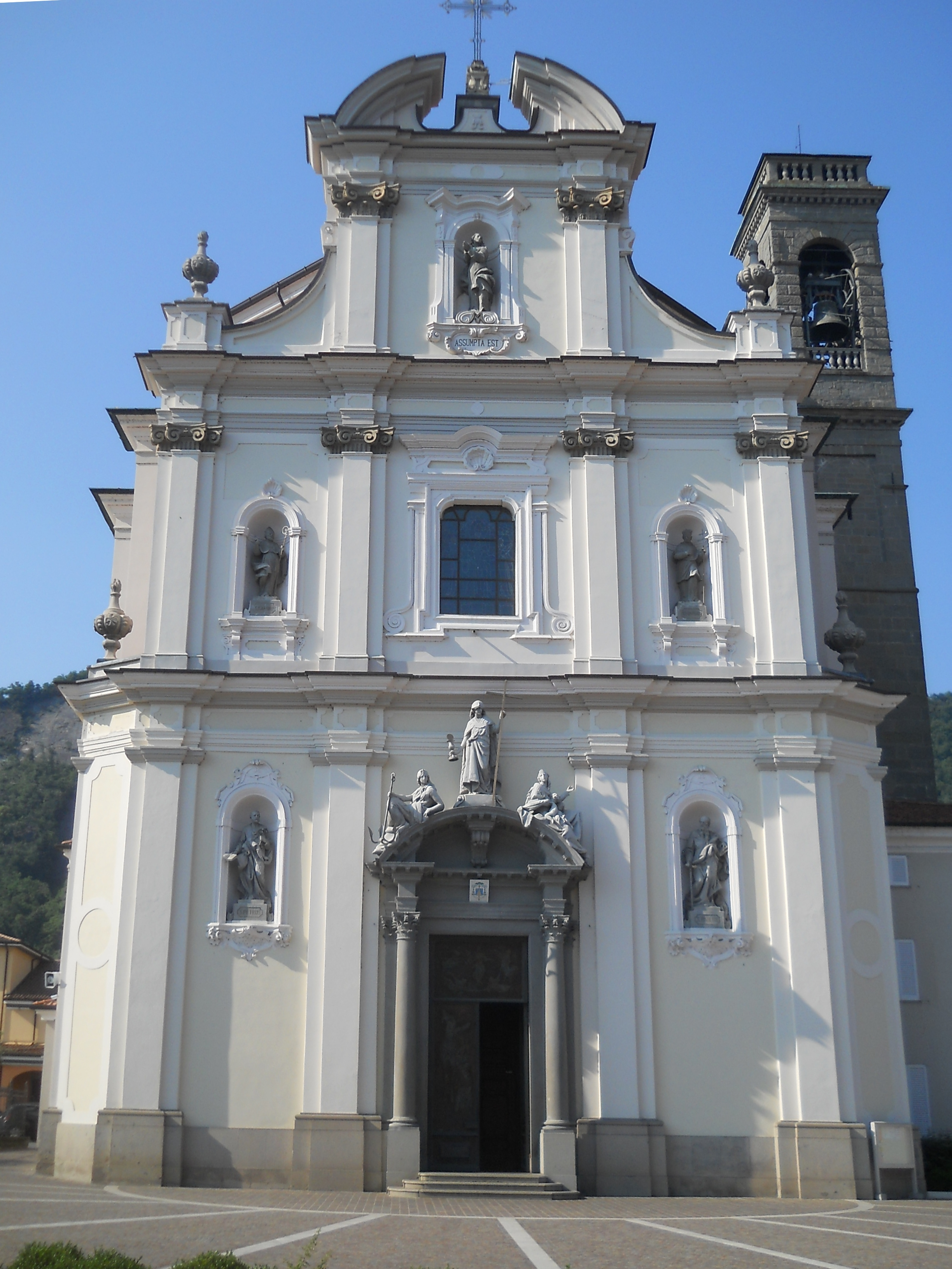 Facciata della chiesa parrocchiale di Sarnico